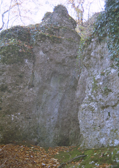 Felsspalt, in den das Zugangstor zum ältesten Teil der Anlage eingefügt war